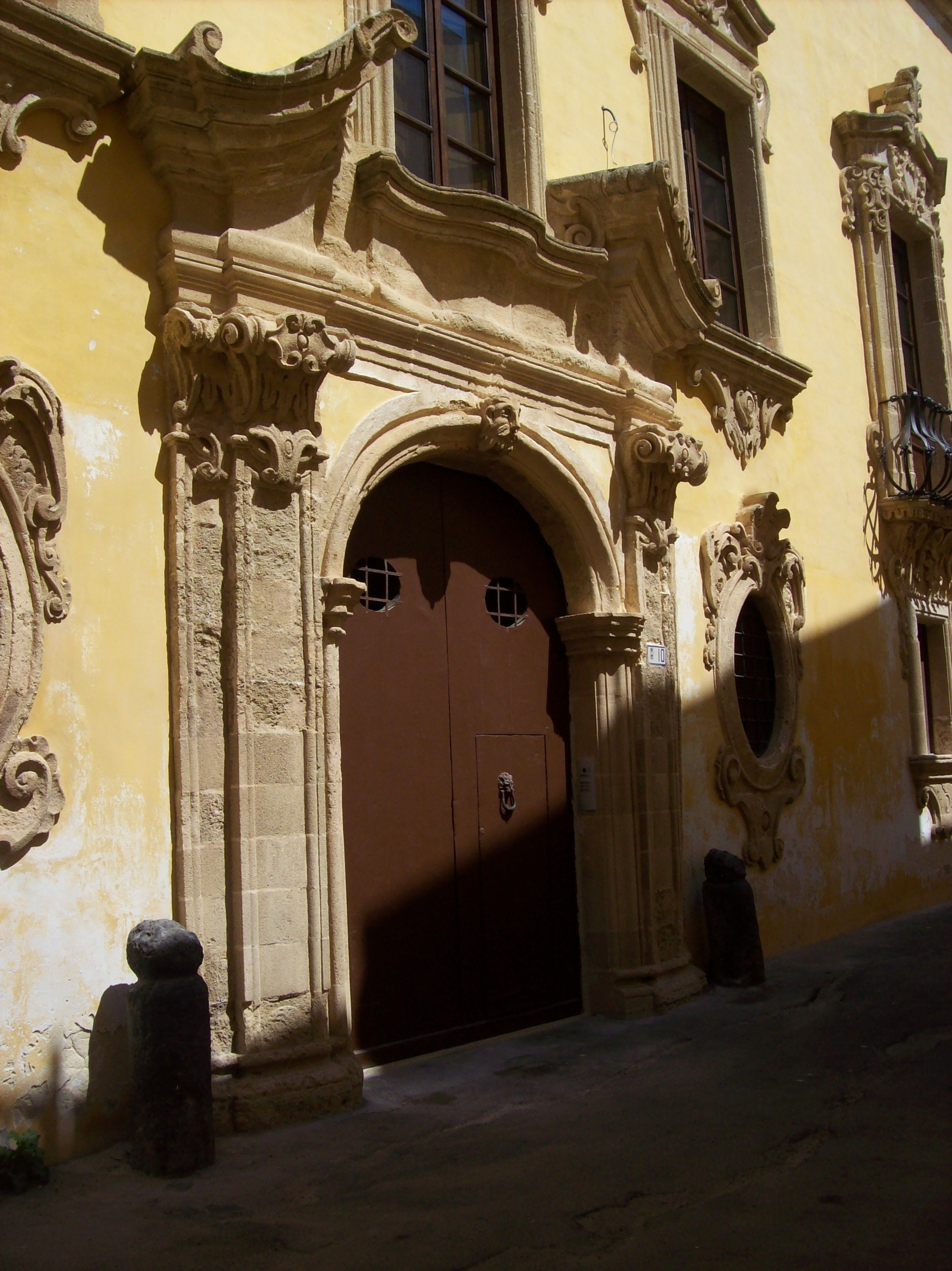 Gallipoli